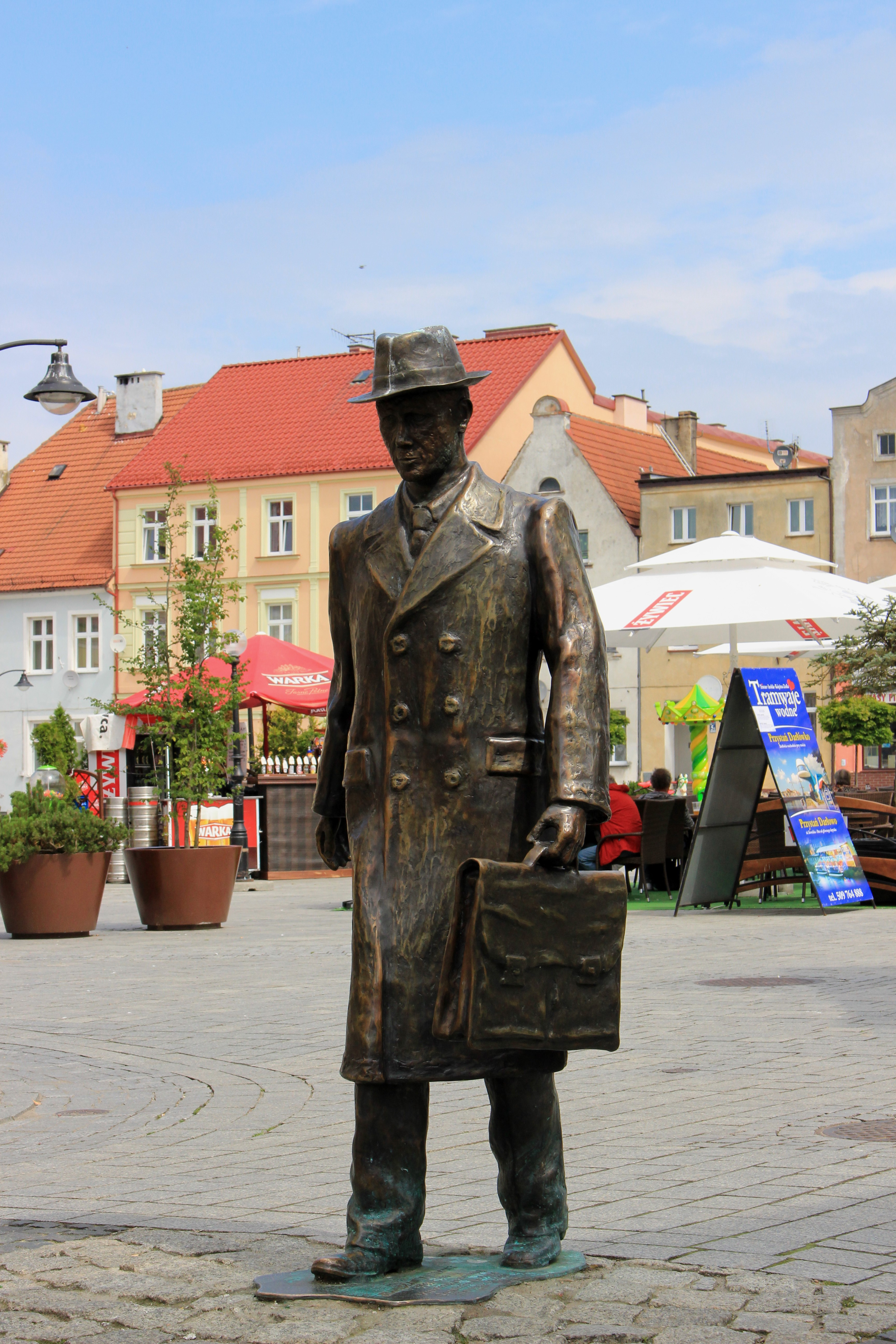 Pomnik Stanisława Dulewicza, pierwszego powojennego burmistrza